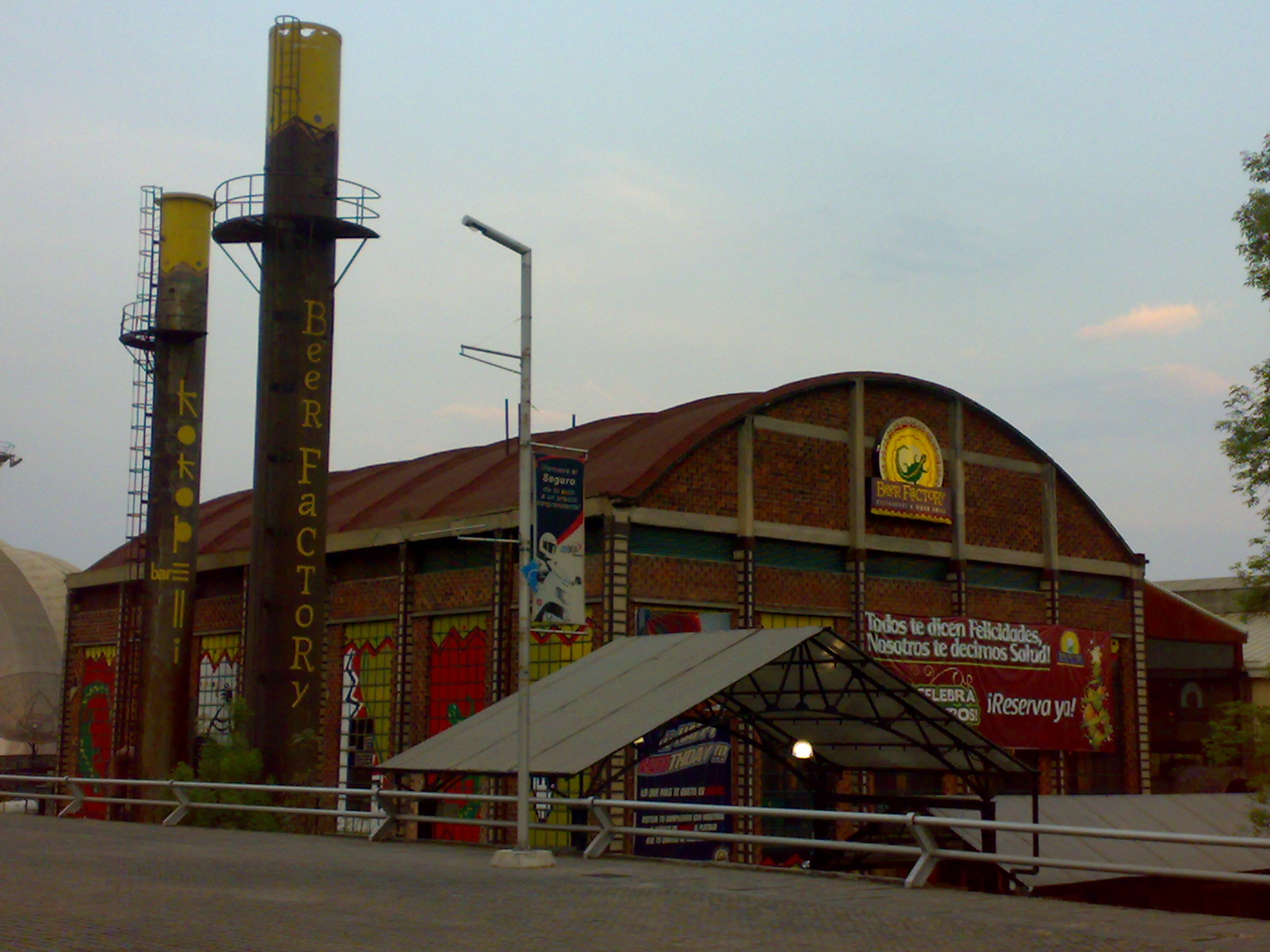 Beer Factory, Plaza Cuicuilco, Tlalpan, México D.F, México